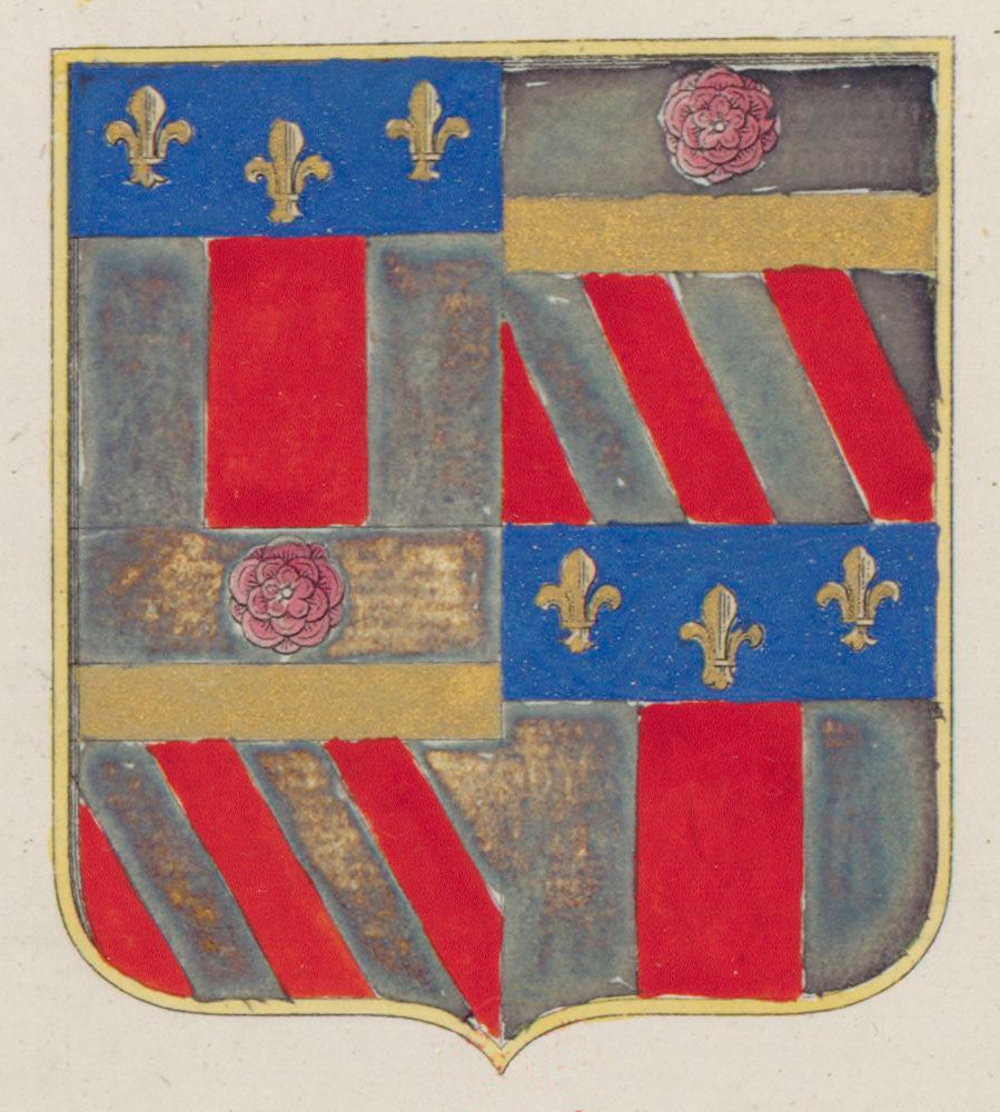 stemma della nobile famiglia umbra d'Alviano